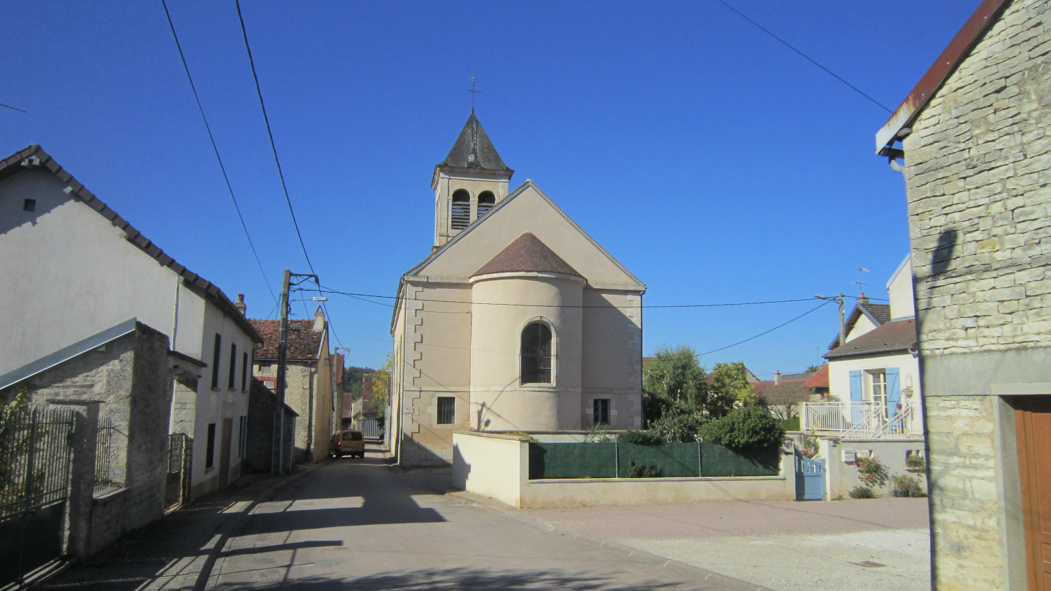 Charrey-sur-Seine (Côte-d'Or)